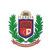 Esta es el escudo de Ilabaya tierra de riquezas